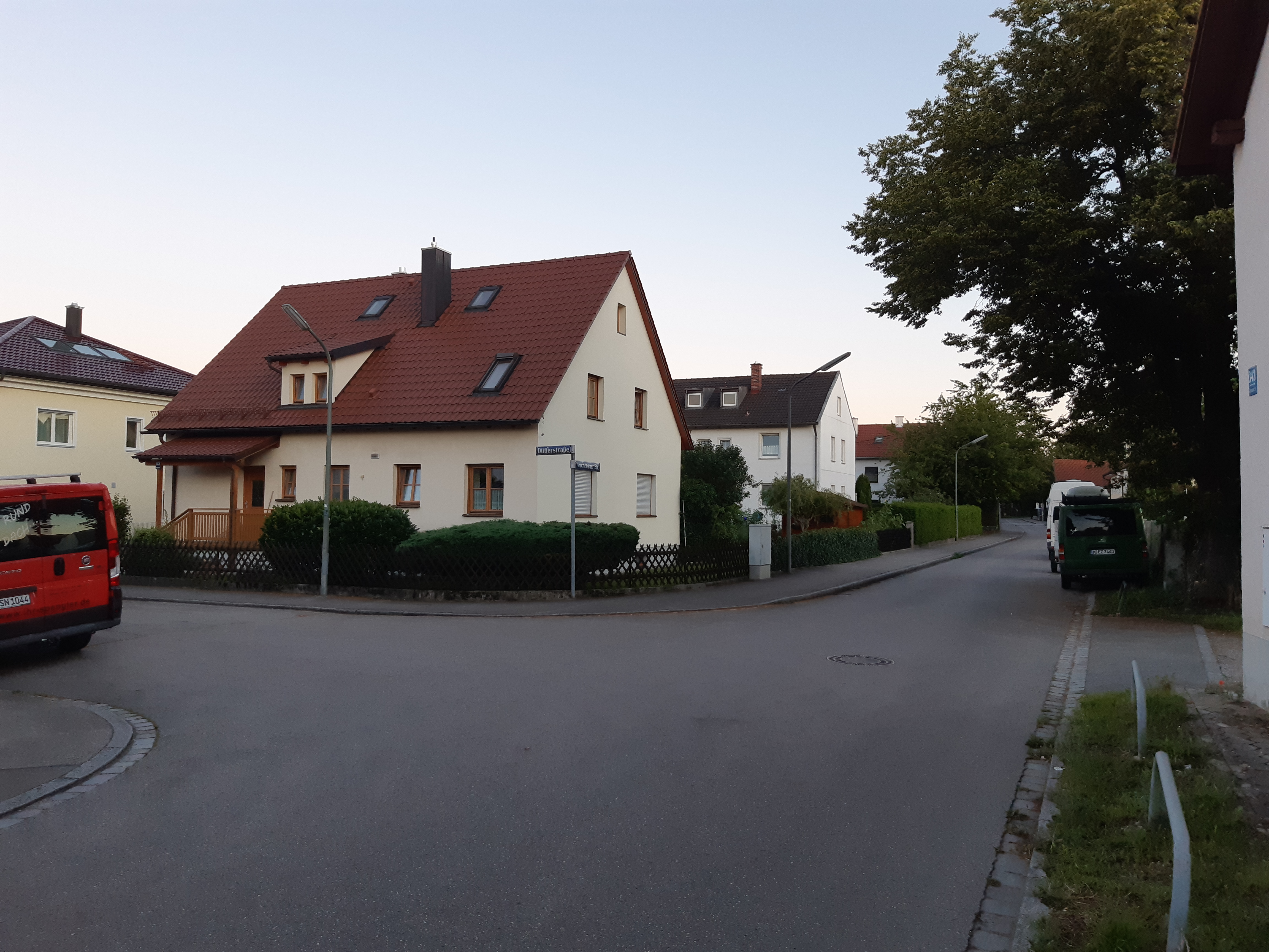 Einbiegung der Dülferstraße in die Lerchenauer Straße